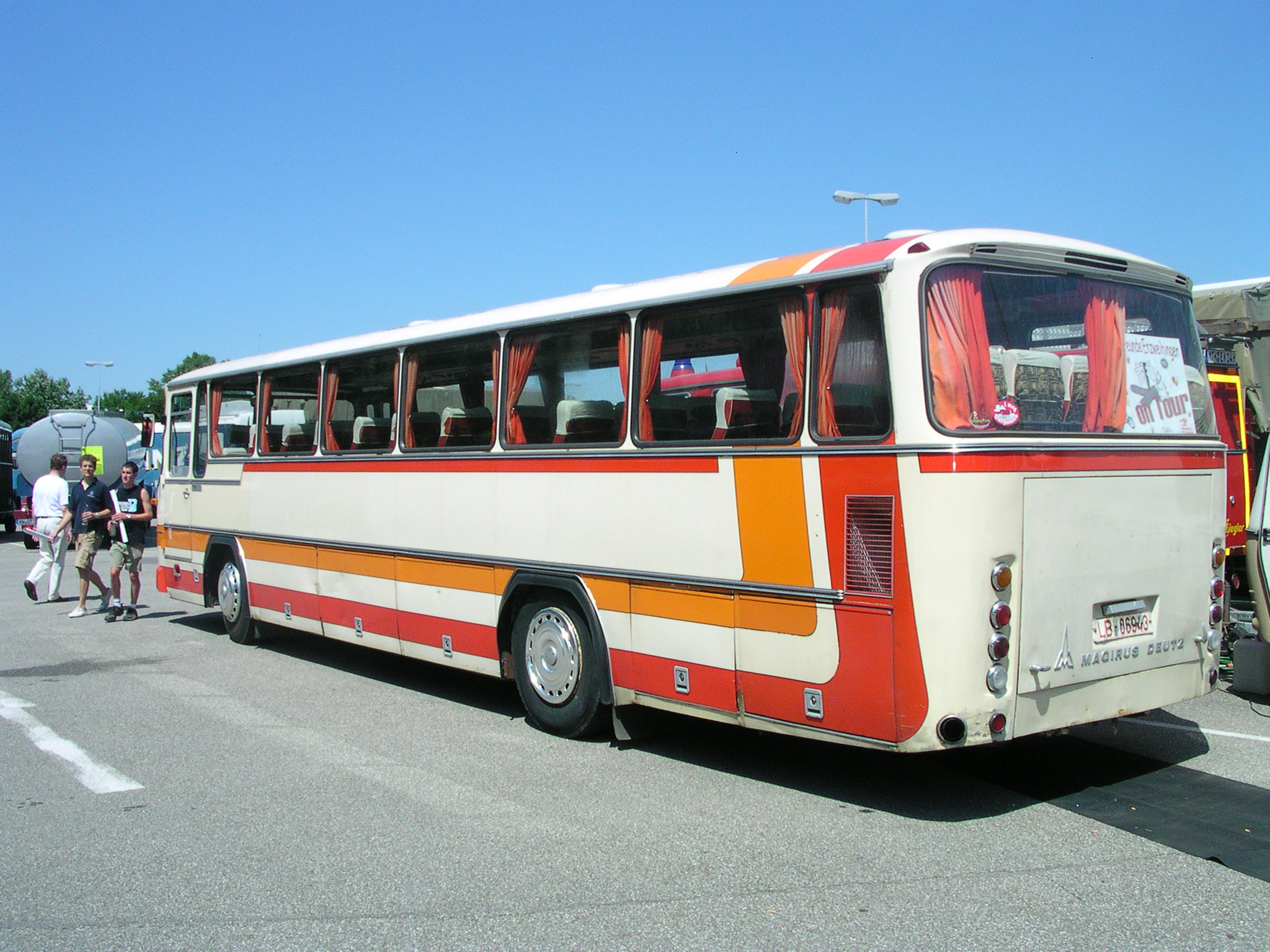 Wörth am Rhein, Oldtimer-Treffen bei Daimler-Chrysler Magirus Reisebus TR 120.